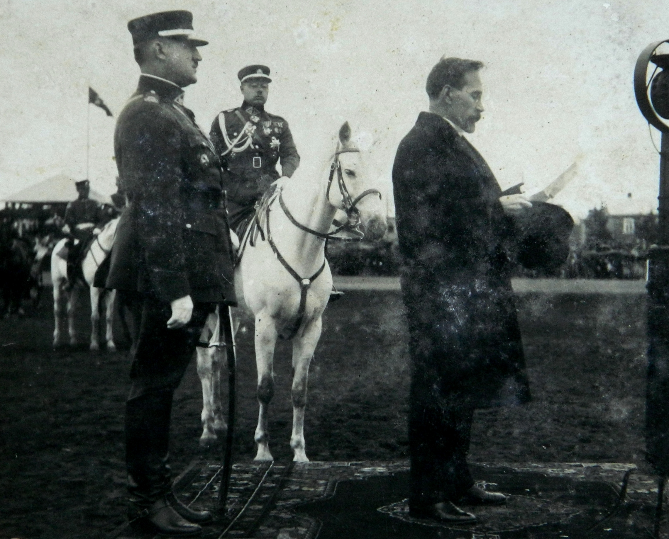 A. Smetona sako kalbą, užnugary stovi KAM ministras Balys Giedraitis, ant žirgo sėdi generolas Petras Kubiliūnas.